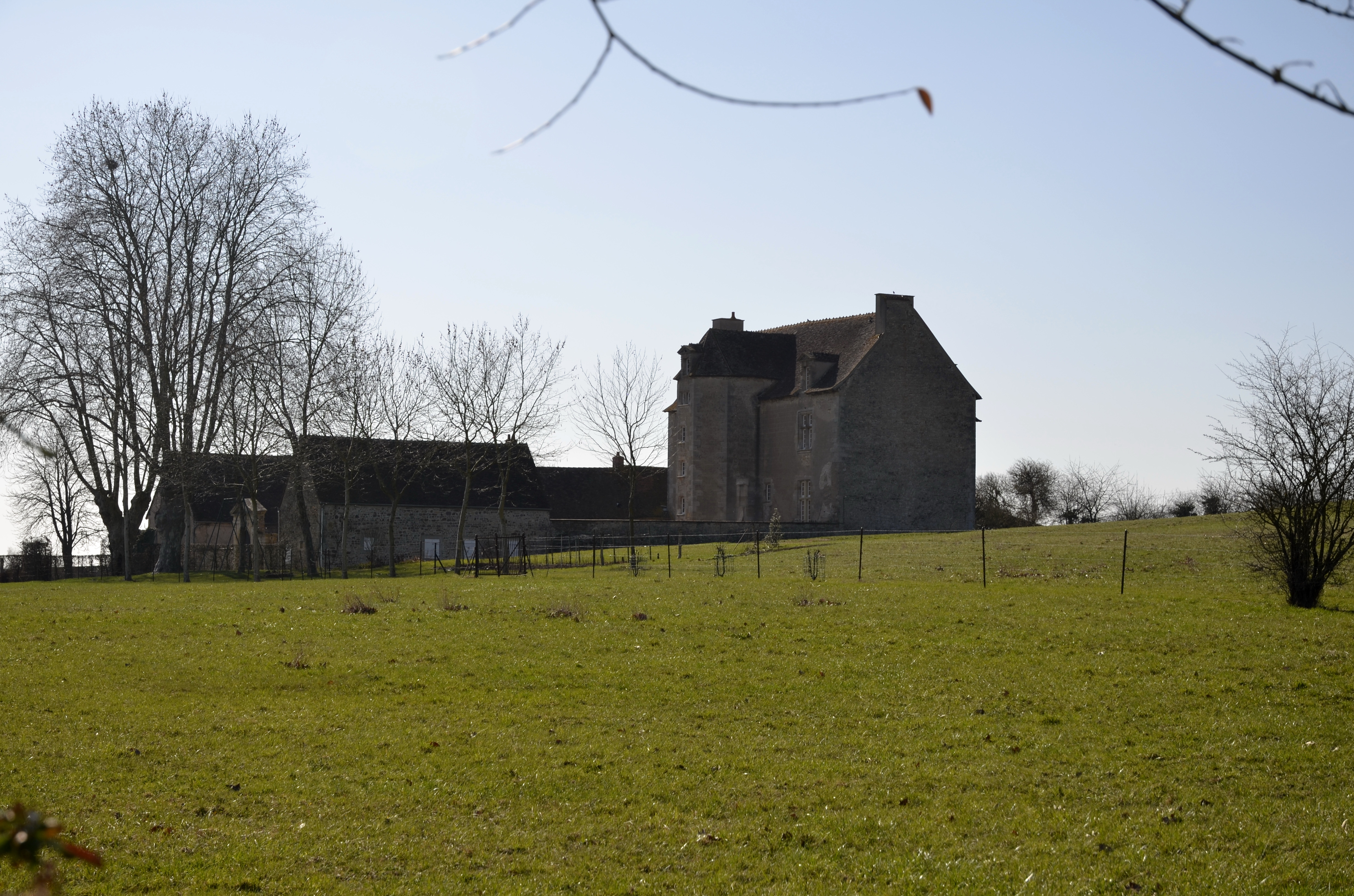 Corps de logis du XVe siècle.